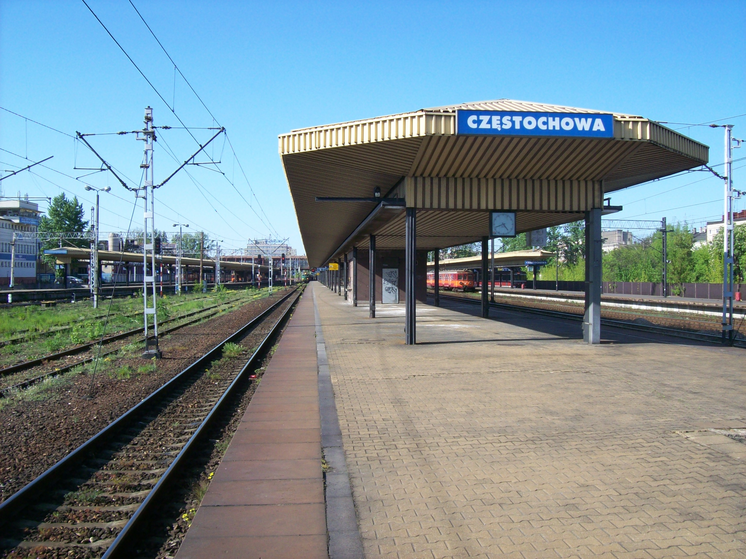 Perony na dworcu głównym PKP Częstochowa.